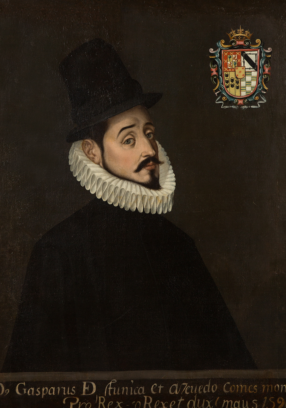 Viceroy Gaspar de Zúñiga y Acevedolabel QS:Len,"Viceroy Gaspar de Zúñiga y Acevedo"label QS:Les,"Virrey Gaspar de Zúñiga y Acevedo"